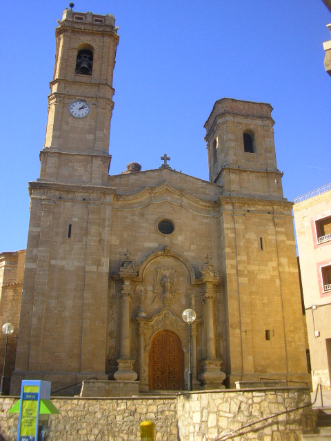 Iglesia parroquial de Aitona